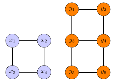 Two structures to explain EF games. The first structure is a square. The second is made up of two adjacent squares.